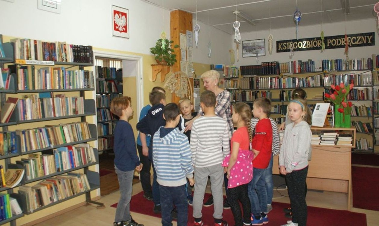 Klub wojskowy. Bibloteka